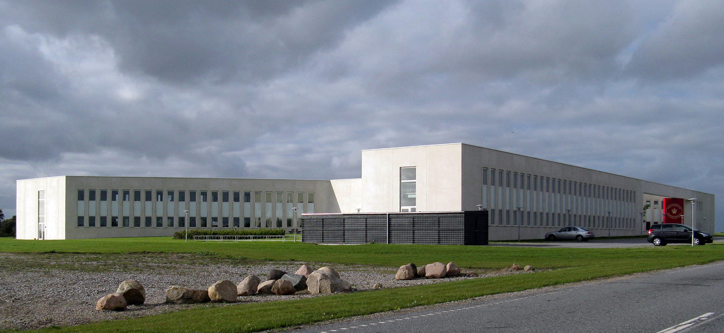 Tinglysningsretten i Hobro